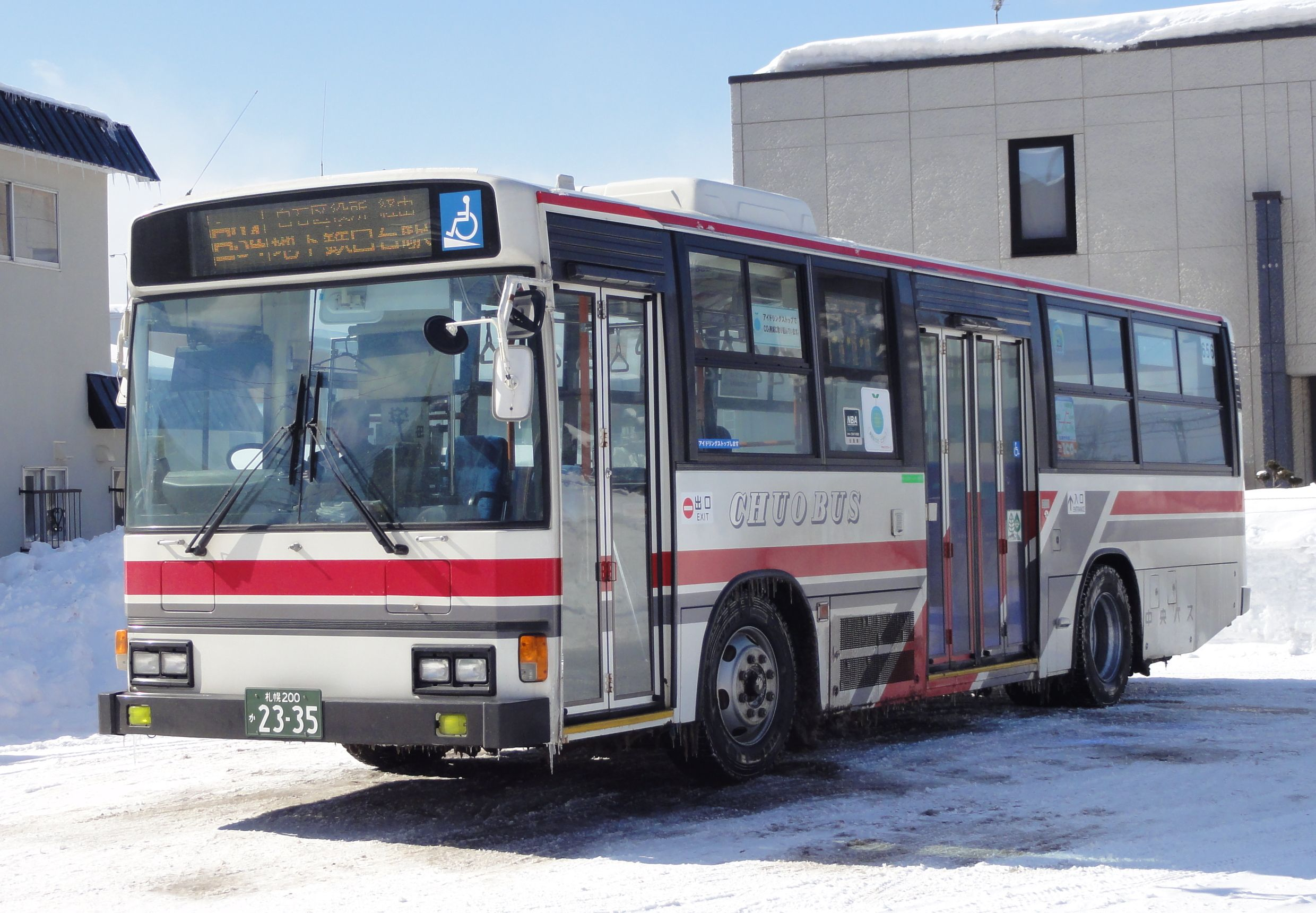 北海道中央バス